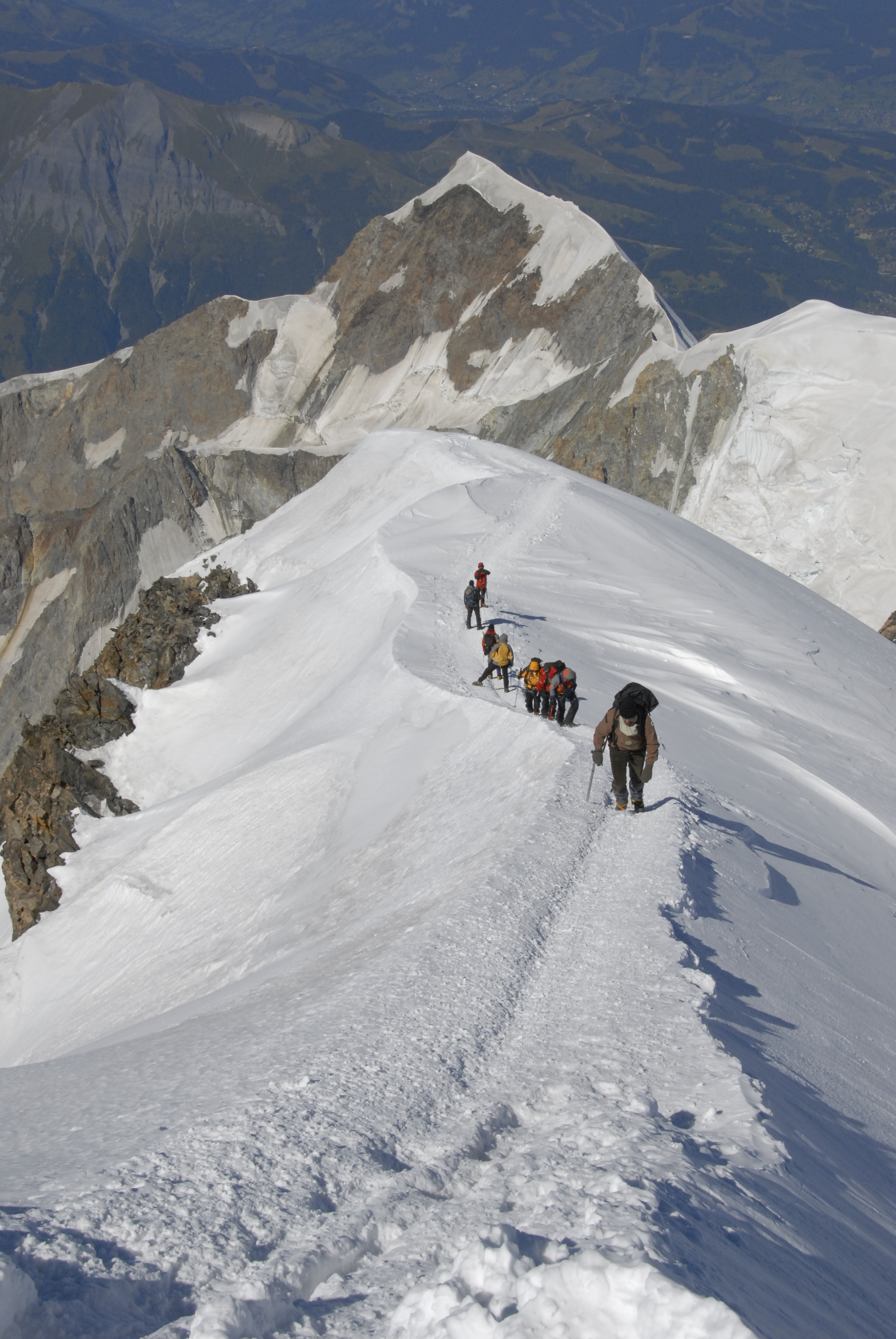 In drum spre Mont Blanc